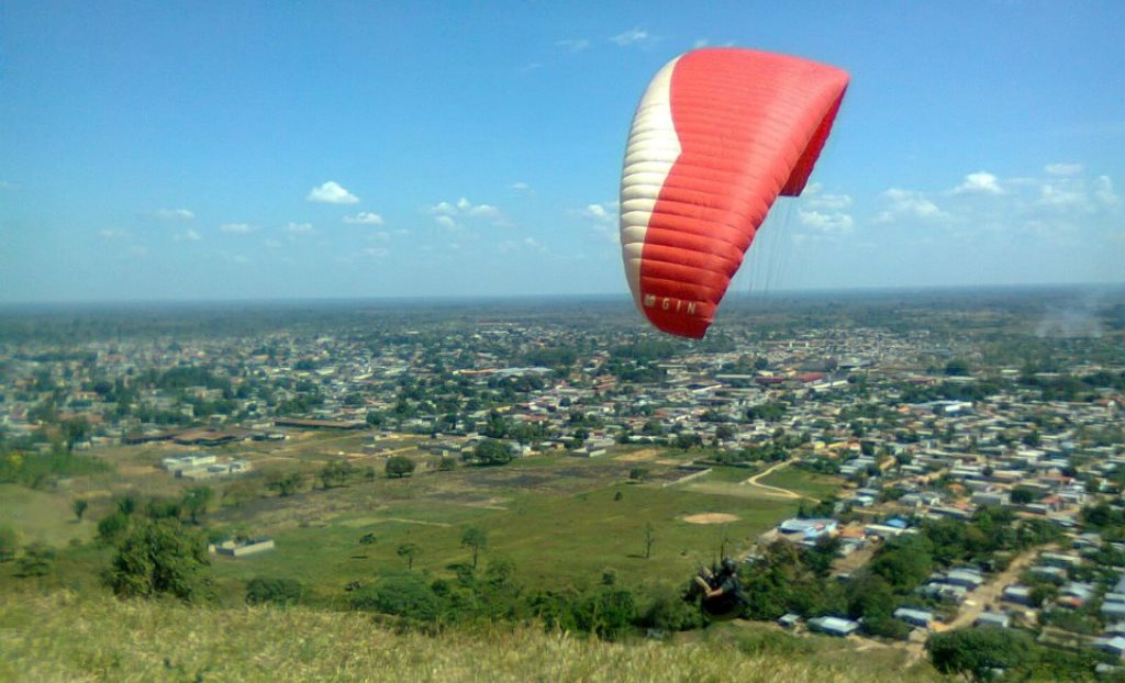 Foto tomada en la zona alta de la ciudad, donde se observa parte de ella, donde se practica el deporte extremo de parapente